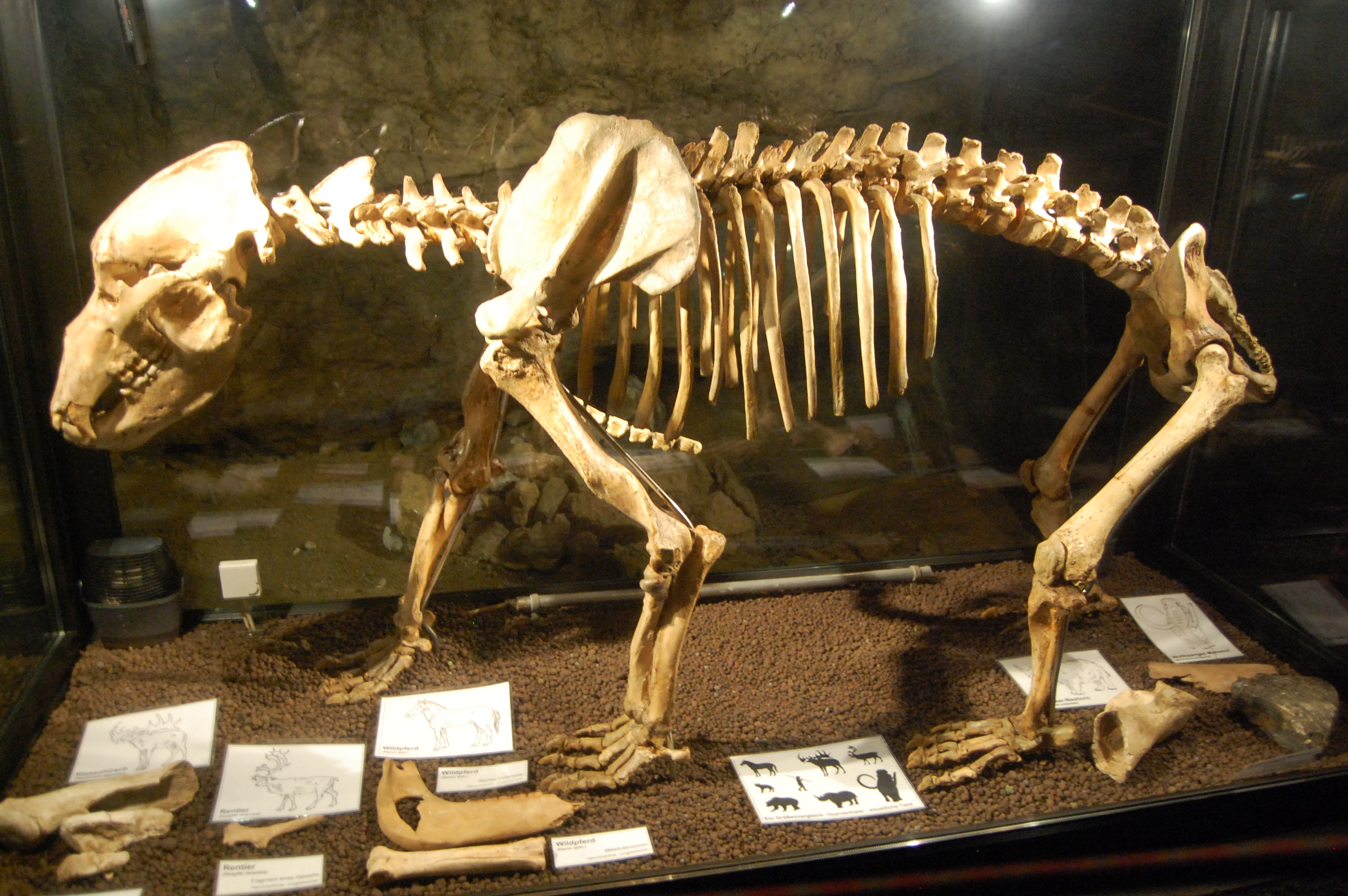 Heinrichshöhle, Bärenskelett